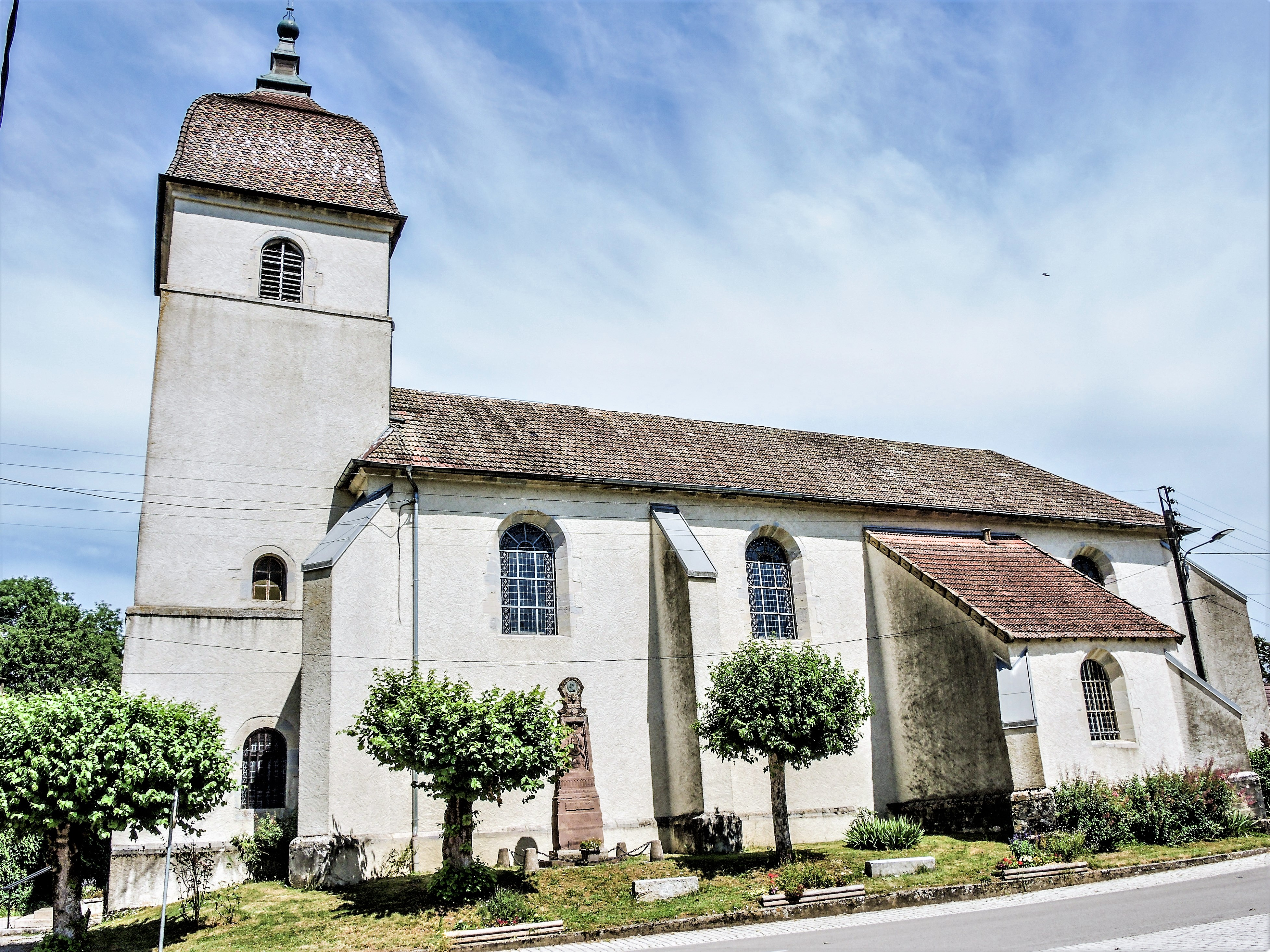 Eglise de Moncey